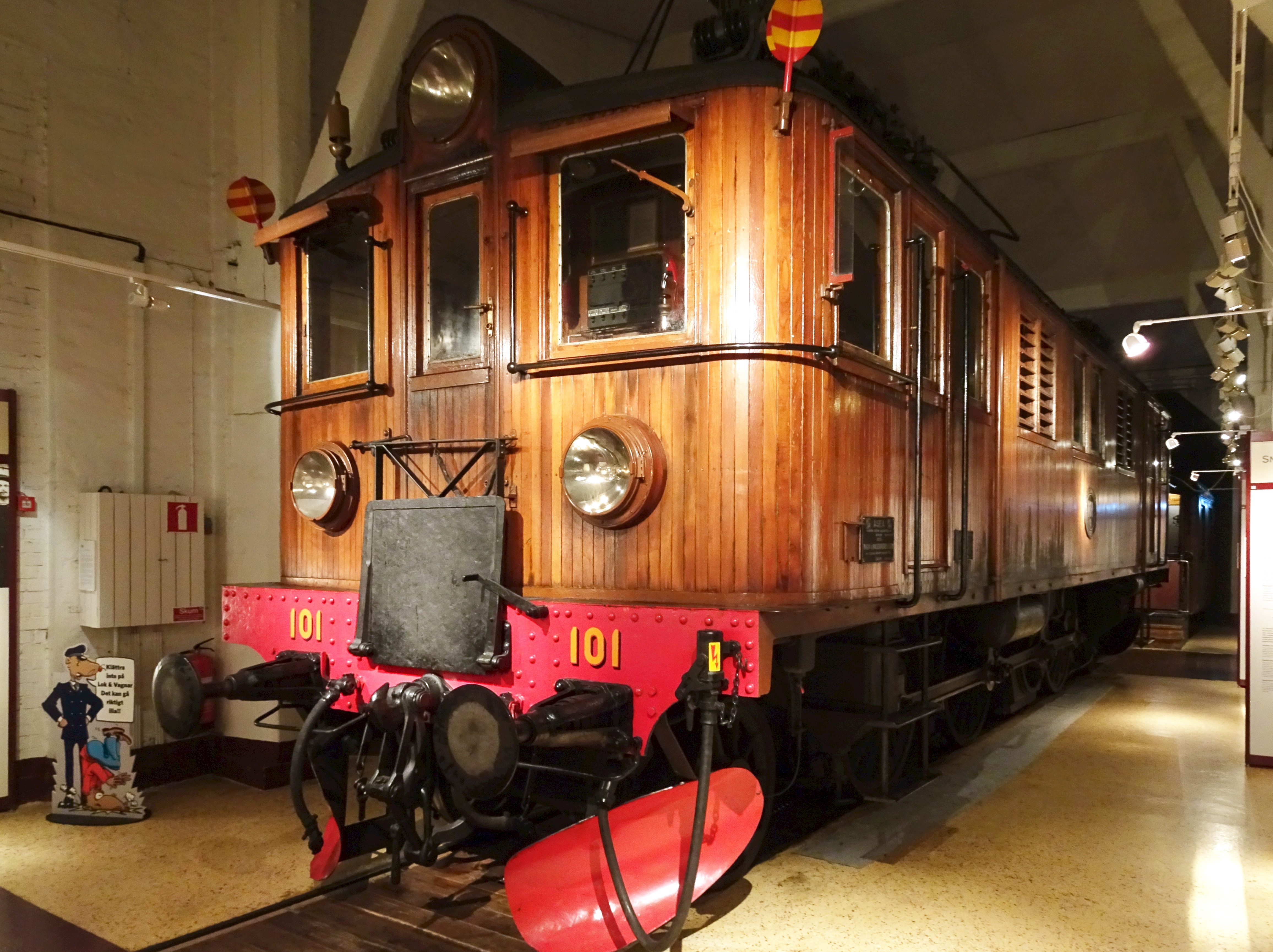 Sveriges Järnvägsmuseum ellok nr 101 (ASEA 1925)